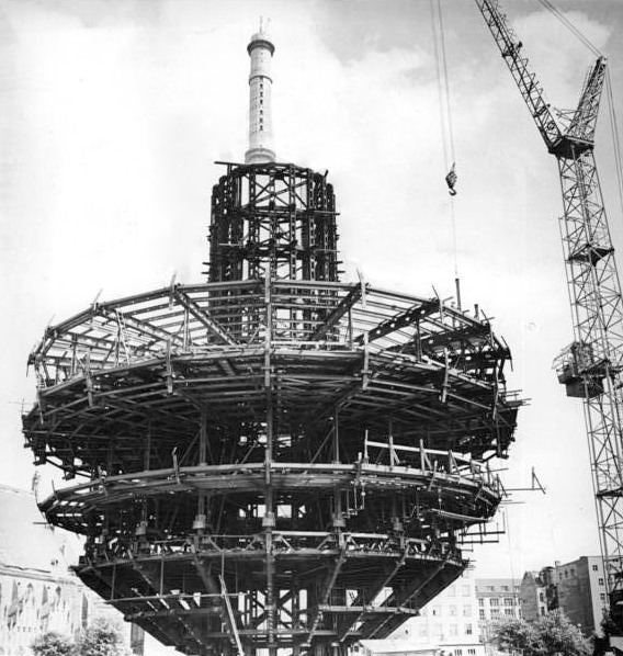 Zentralbild Koard Sues 18.8.1967 Berlin: Stahlskelett der Turmkugel des Fernsehturmes wächst. Auf einem Platz vor dem Berliner Rathaus wächst das Stahlskelett der Turmkugel des Fernsehturmes. Monteure des VEB Industriemontage Leipzig sind unermüdlich hier tätig. Die Turmkugel wird in einer Höhe von 200 Meter - etwa in der Höhe des hier sichtbaren Teils des Turmes - später montiert. In dieser Höhe befinden sich dann Café und Aussichtsplattform des Turmes. Die Gesamthöhe des Turmes wird 362 Meter betragen.